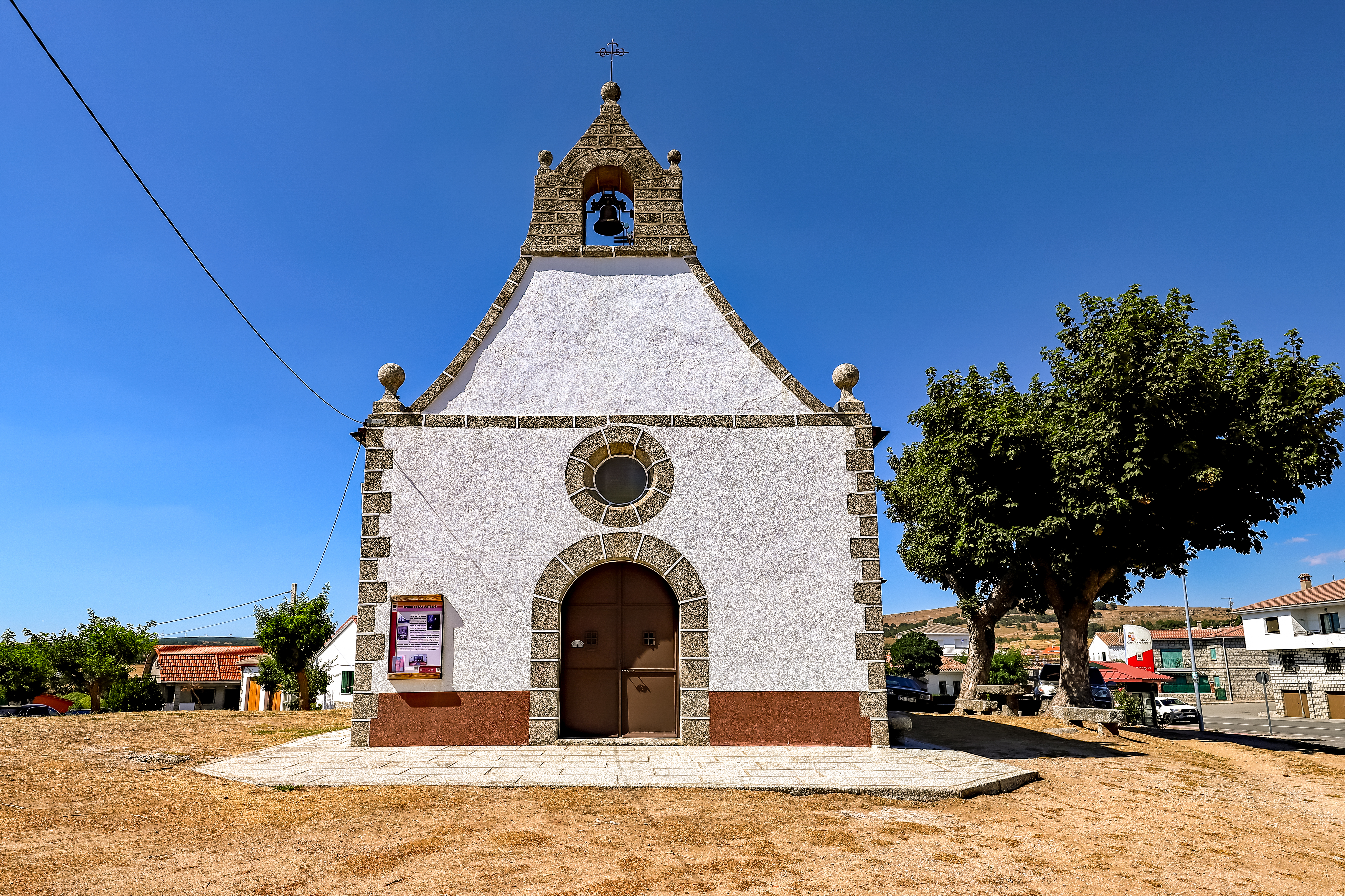 Navalperal de Pinares es un municipio de la comarca Tierra de Pinares, en la provincia de Ávila.